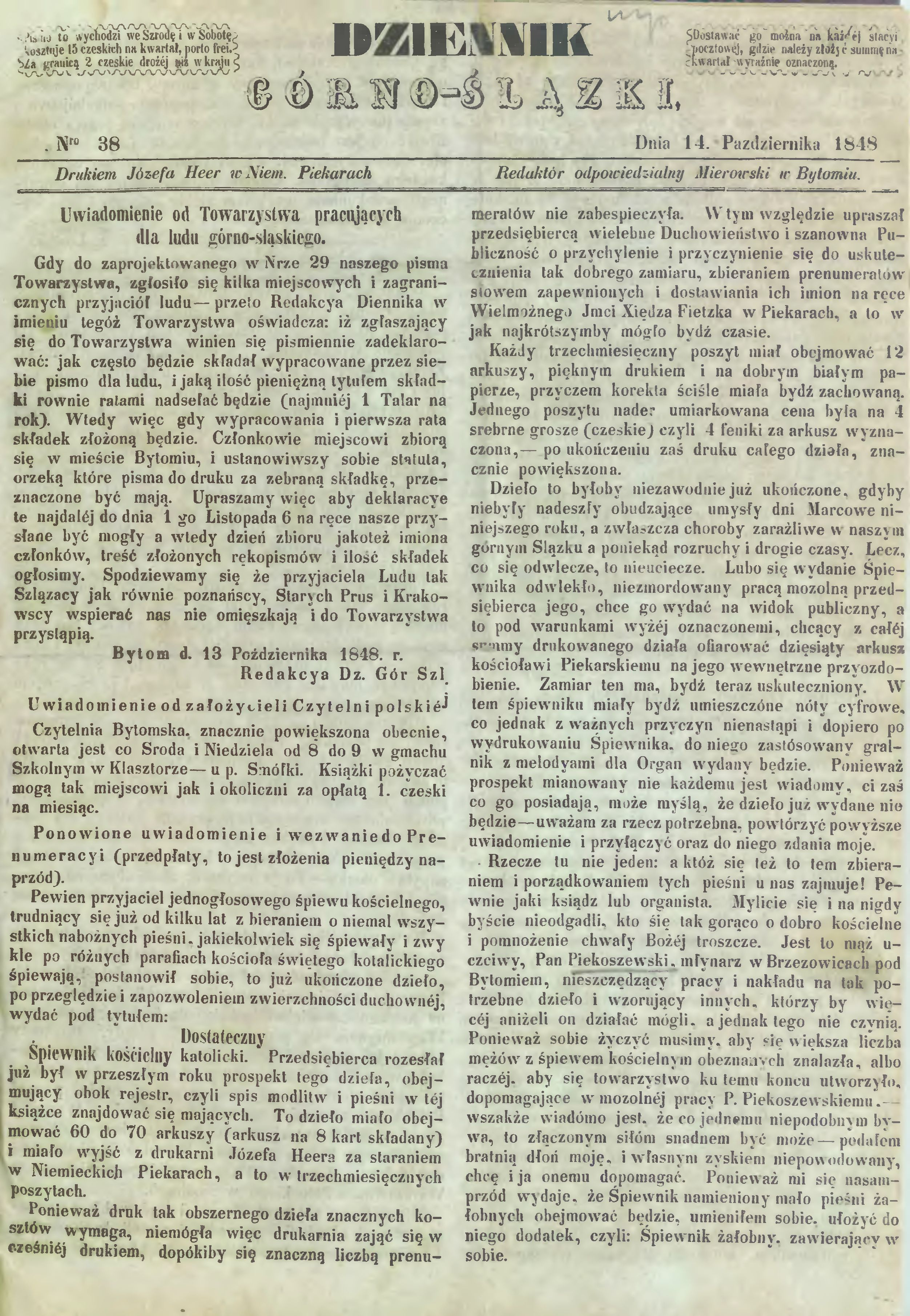 Karta tytułowa Dziennika Górnośląskiego z 14 października 1848 r. drukowanego w Niemieckich Piekarach (Piekarach Śląskich) przez Teodora Heneczka.